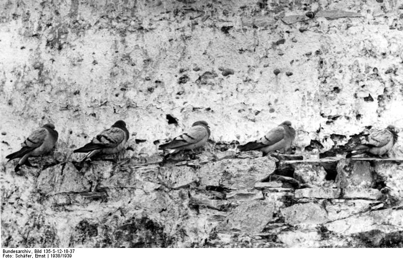 Felsentauben, in der Nähe ihrer Bruthöhlen sitzend Information added by Wikimedia users.Hill Pigeon Columba rupestris